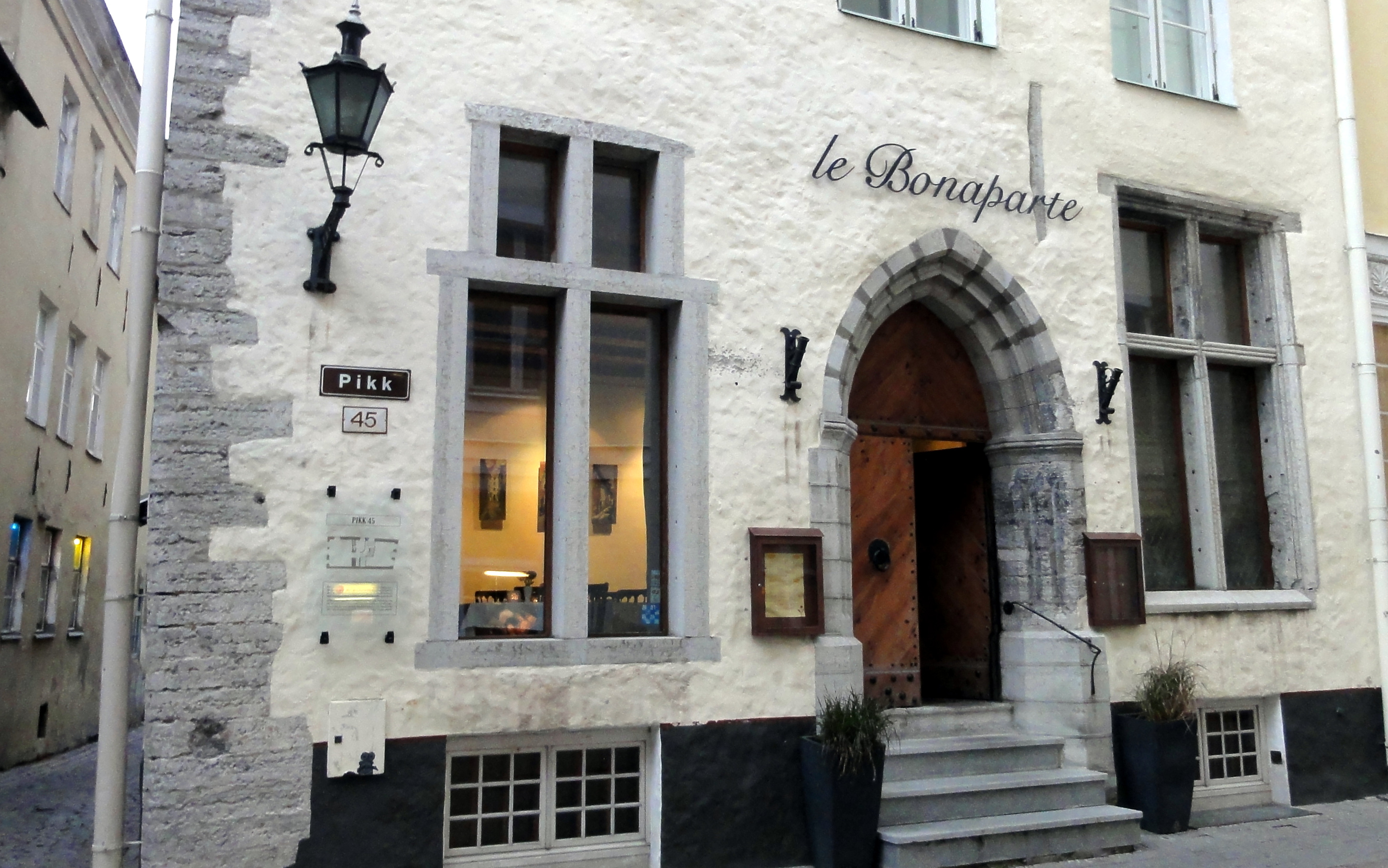 Le Bonaparte